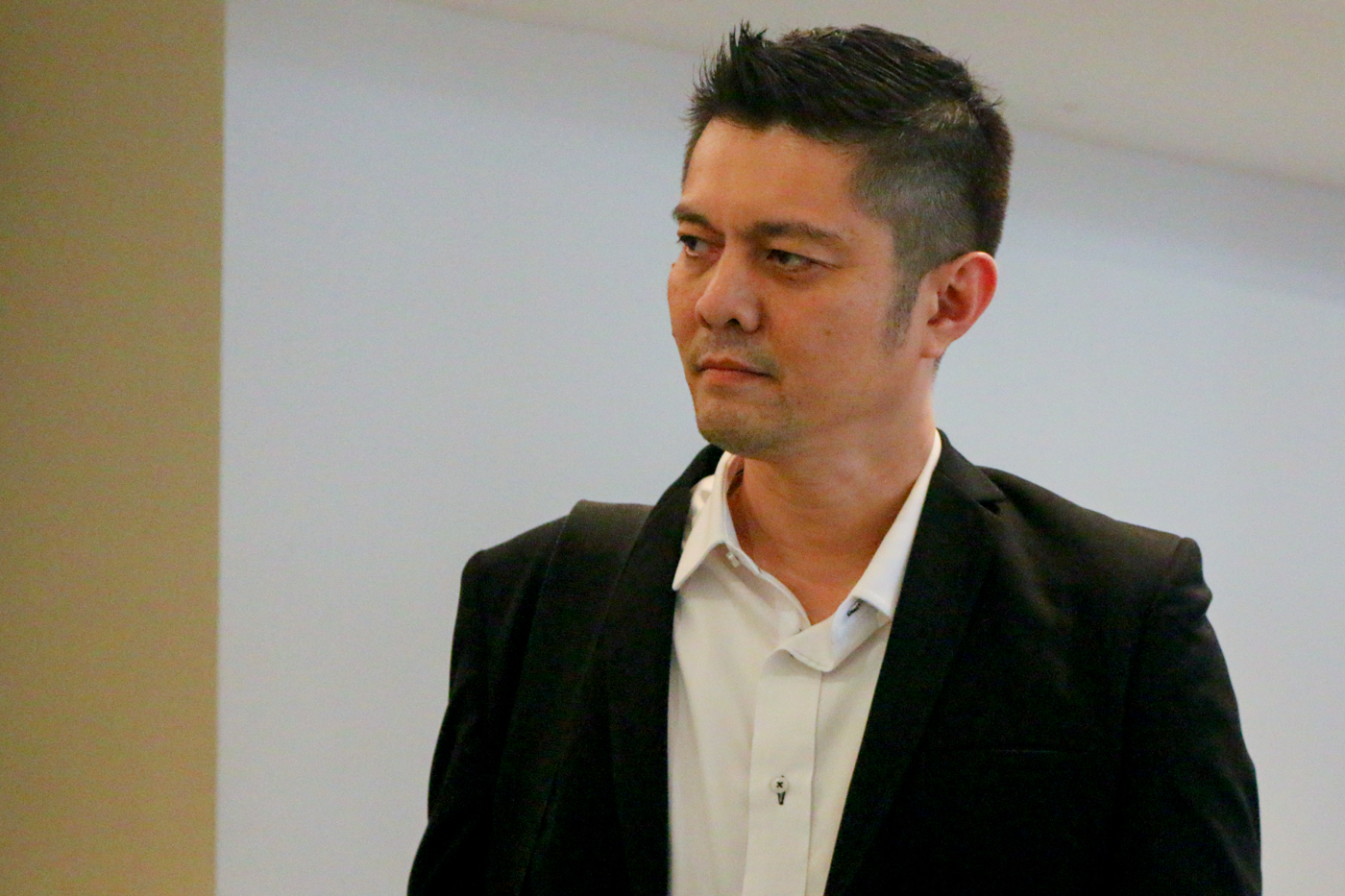 Ivan Lanin dalam acara penutupan dan pengumuman pemenang kompetisi Proyek Ganesha di Wikipedia bahasa Indonesia di Goethe-Institut Indonesien, 28 Februari 2018.